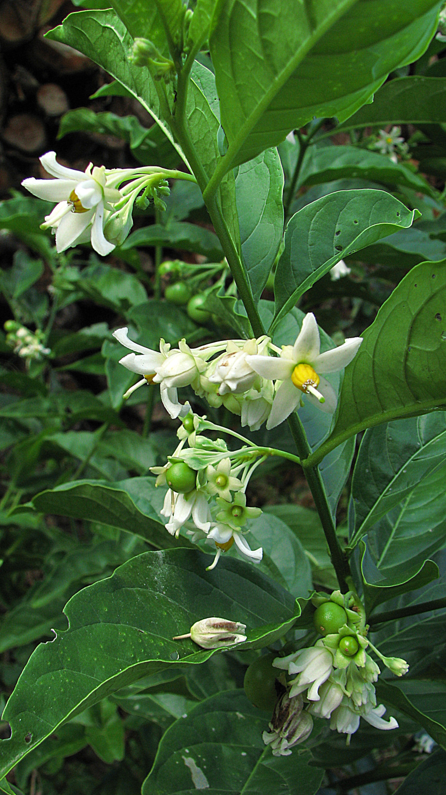 Solanum campaniforme